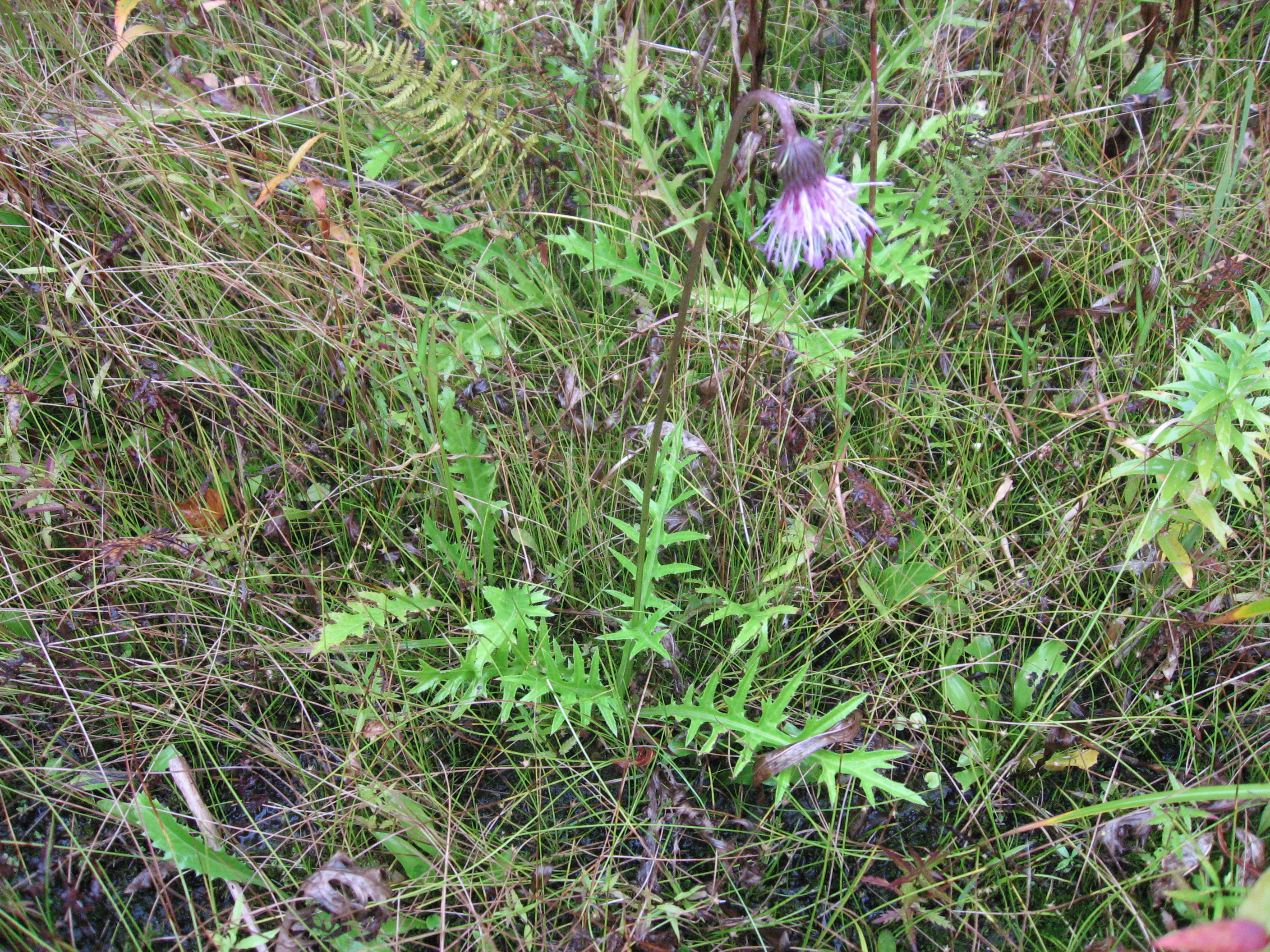 福島県会津若松市湊町